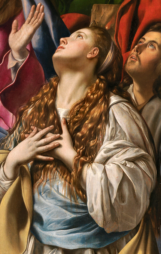 detail: María Magdalena